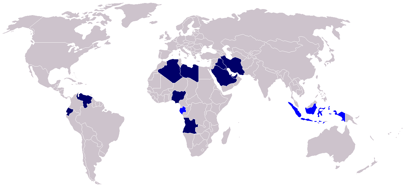 Leden van de OPEC in 2008. De lichtblauw gekleurde landen zijn voormalige leden